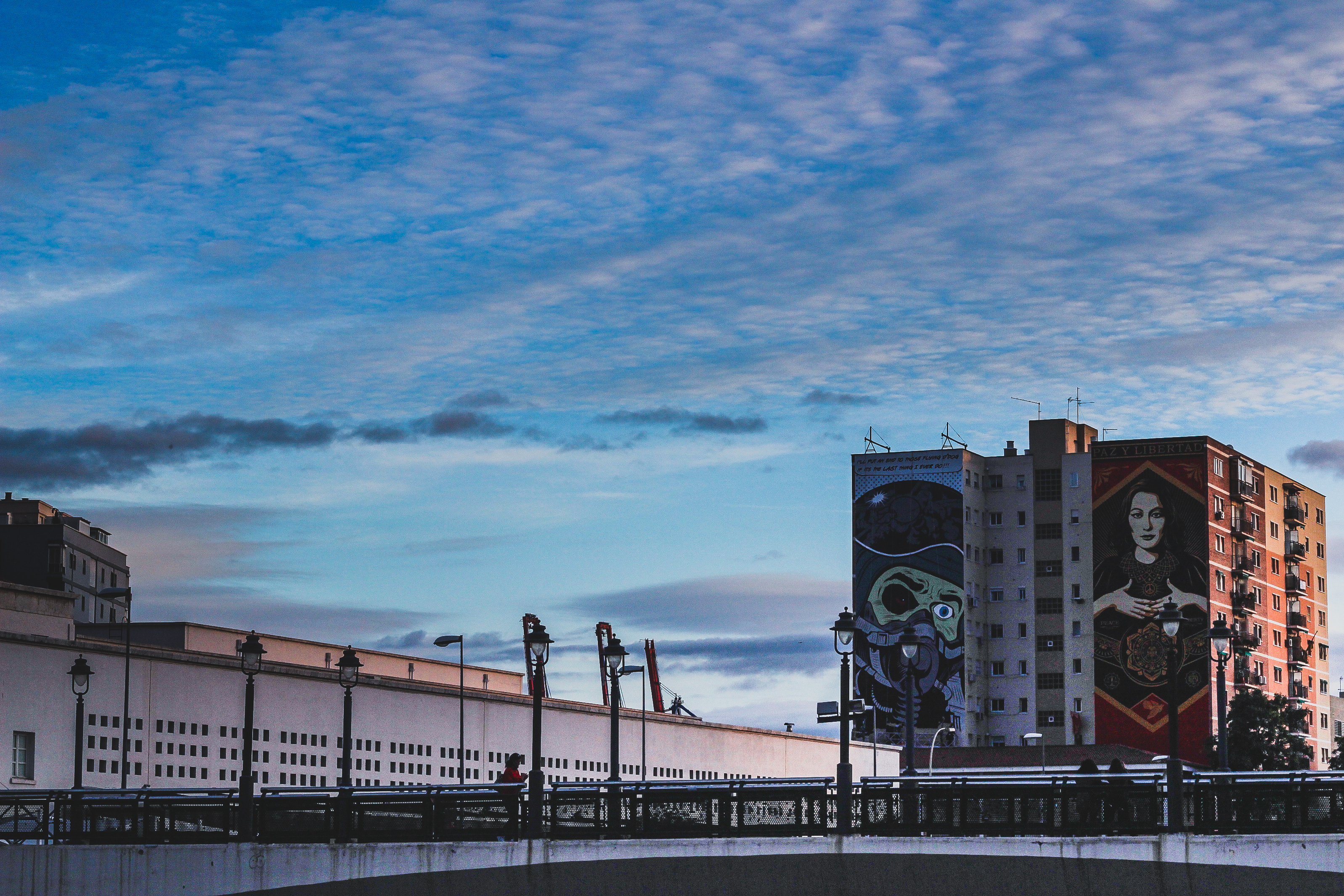 Murales de arte urbano de los artistas Obey y D*Face junto al Centro de Arte Contemporáneo (CAC) de Málaga, España.